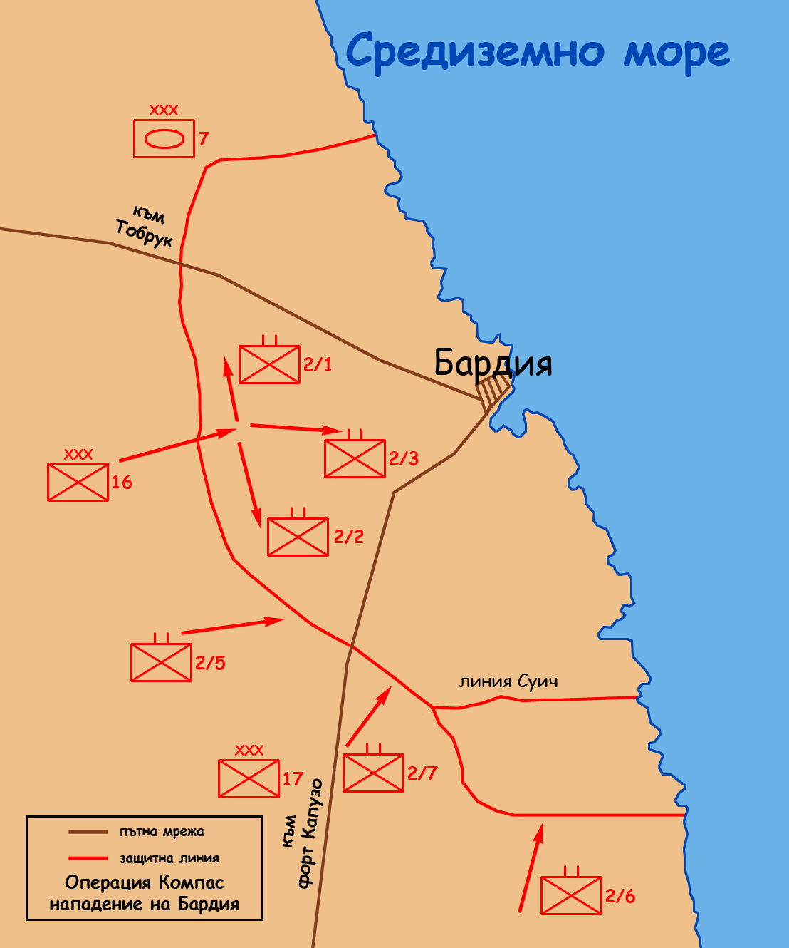 Операция Компас. Нападението на Бардия. Начало на операцията.